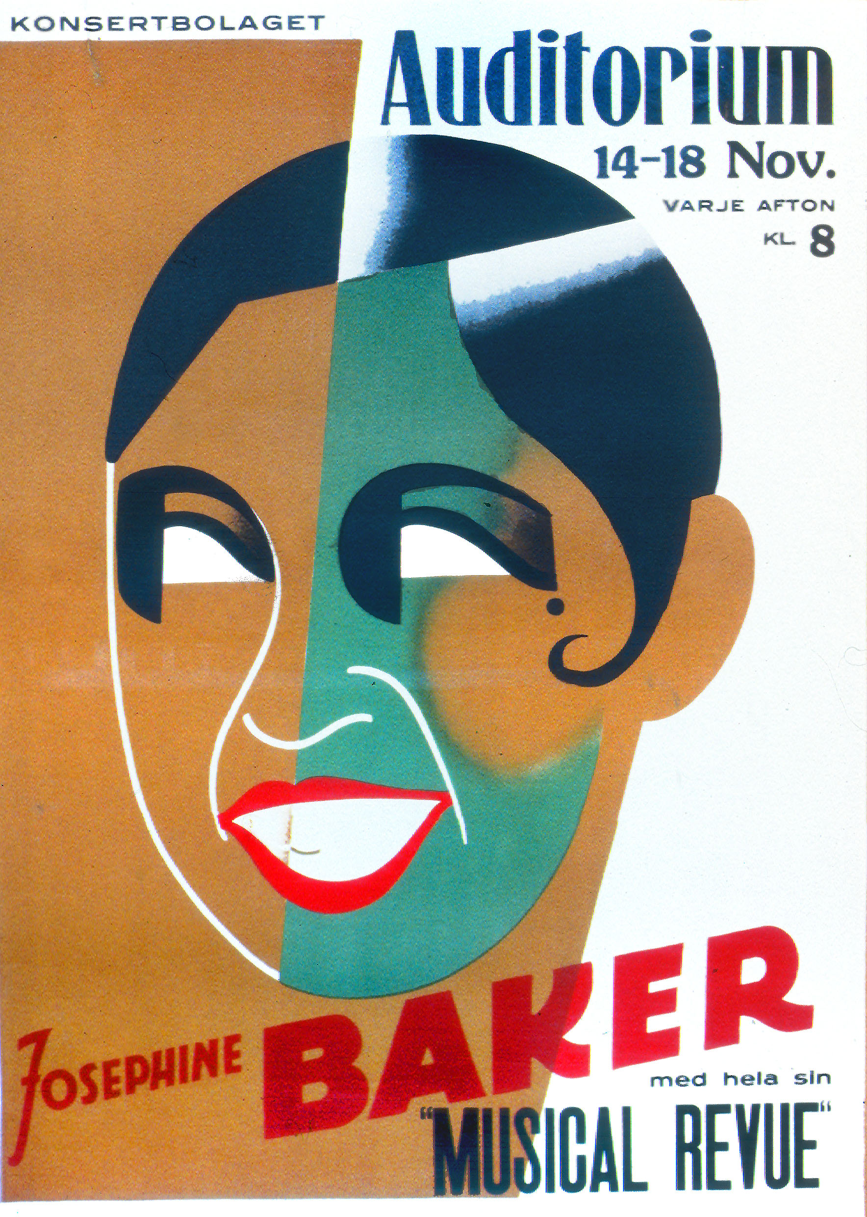 Reklamaffisch för Josephine Bakers svenska gästspel på Auditorium i Stockholm, troligtvis 1938.